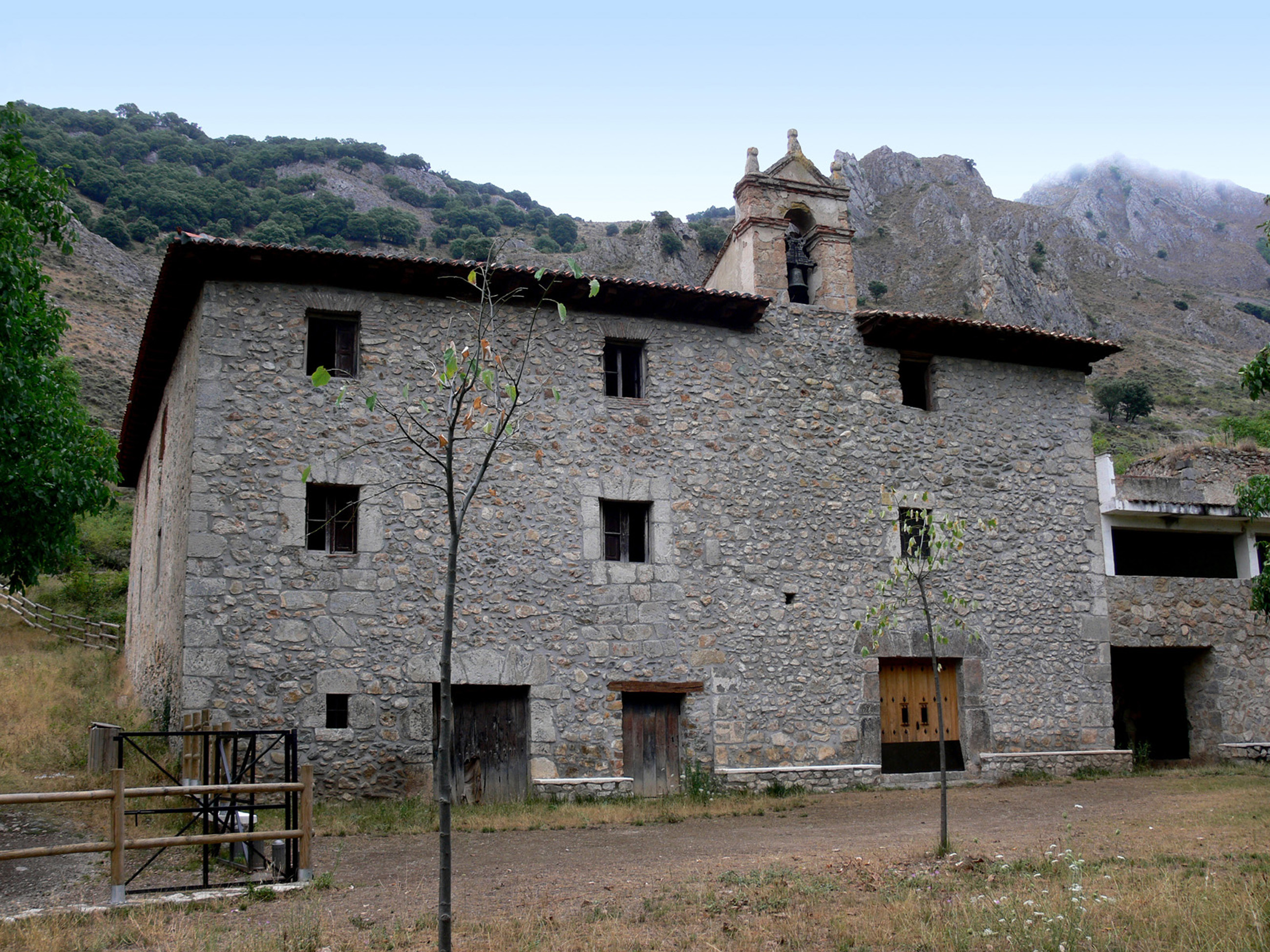 ANGUIANO. Ermita de Santa María Magdalena (sXVIII).